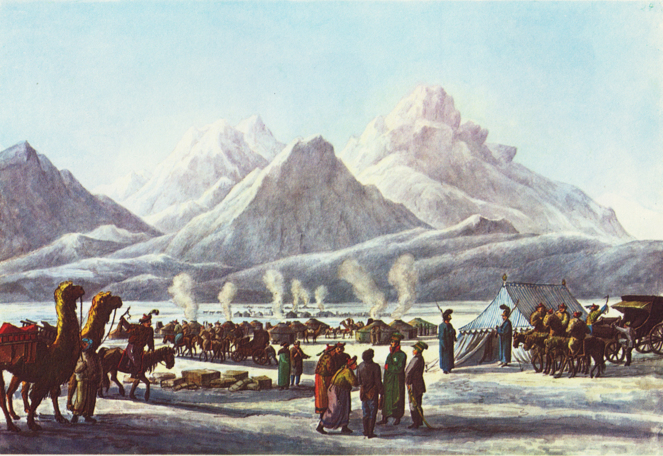 Aufbruch der Razumovskij-Gesandtschaft von einem Lagerplatz 1806